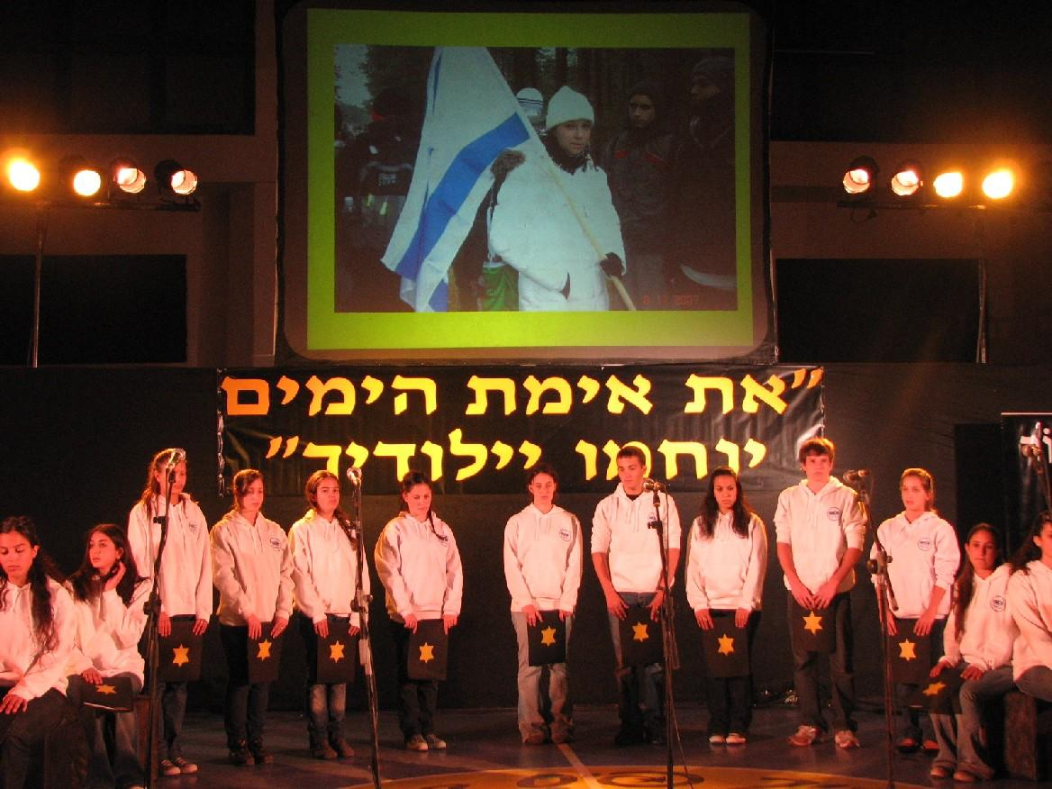 טקס יום השואה בתיכון ישראלי